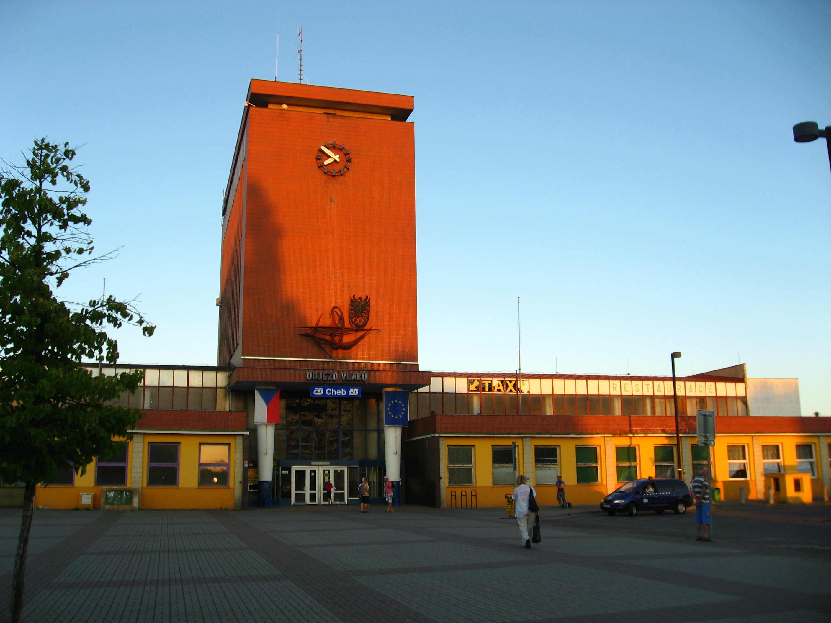 Nádraží v Chebu